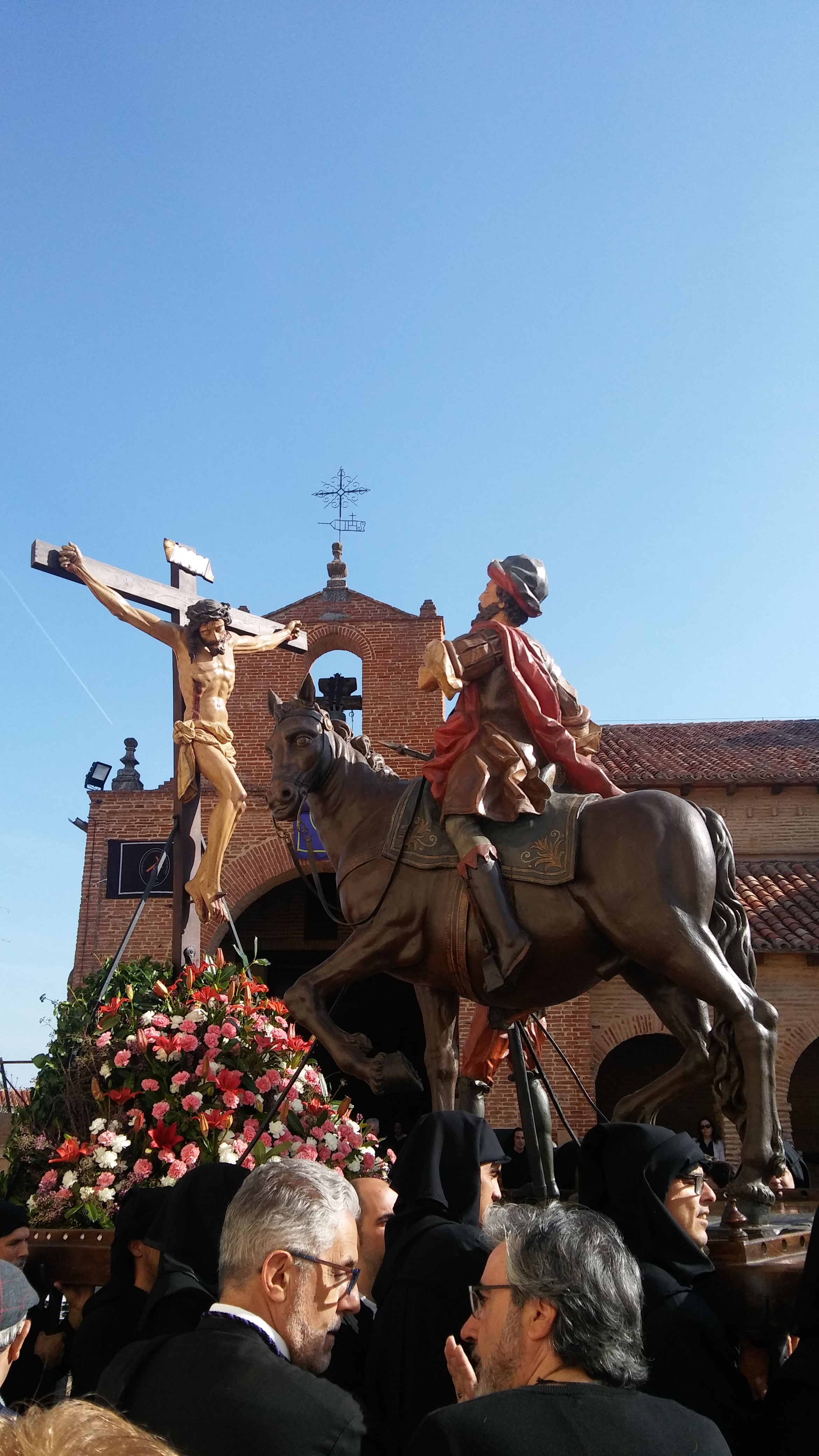 semana santa sahagun